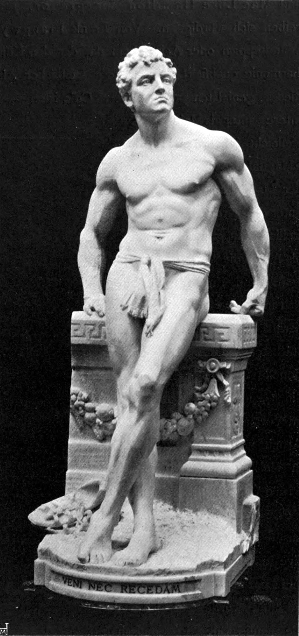 L'Athlète